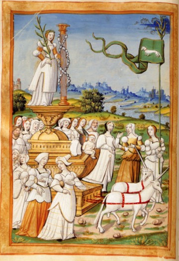 Il Trionfo della Pudicizia